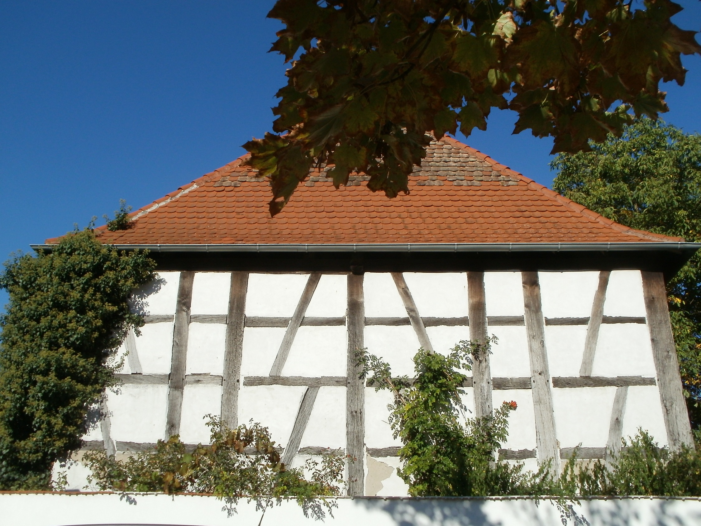 Scheune Kolpingstraße 12 (Oberhausen-Rheinhausen)